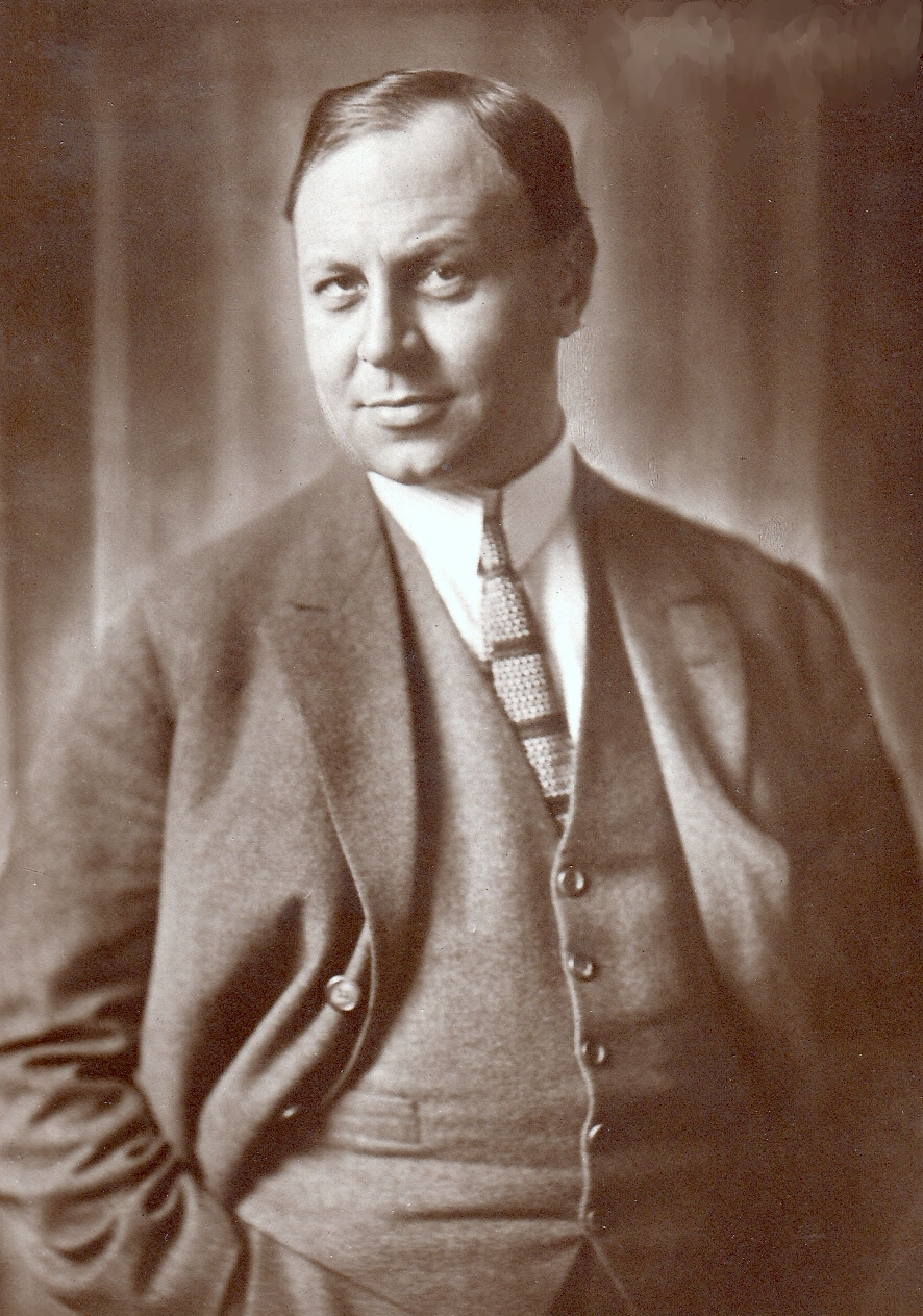 Emil Jannings. Postcard.